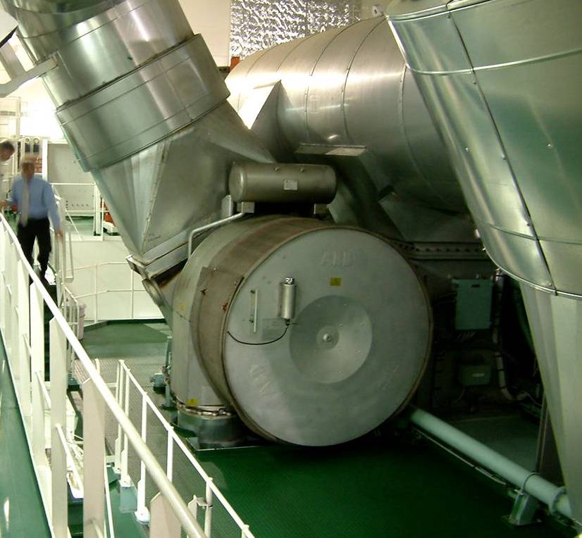 Abgasturbolader eines Schiffsantriebsmotors